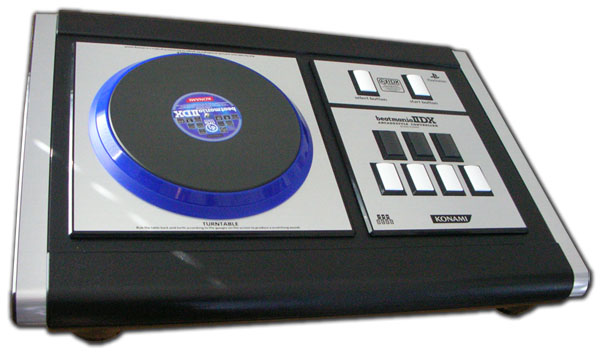 Konami Arcade Style Controller (ASC) -kotiohjain beatmaniaIIDX:n pelaamiseen. Itse otettu 12.3. 2006.